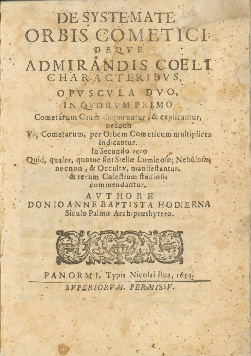 Hodierna De systemate 1654 title page